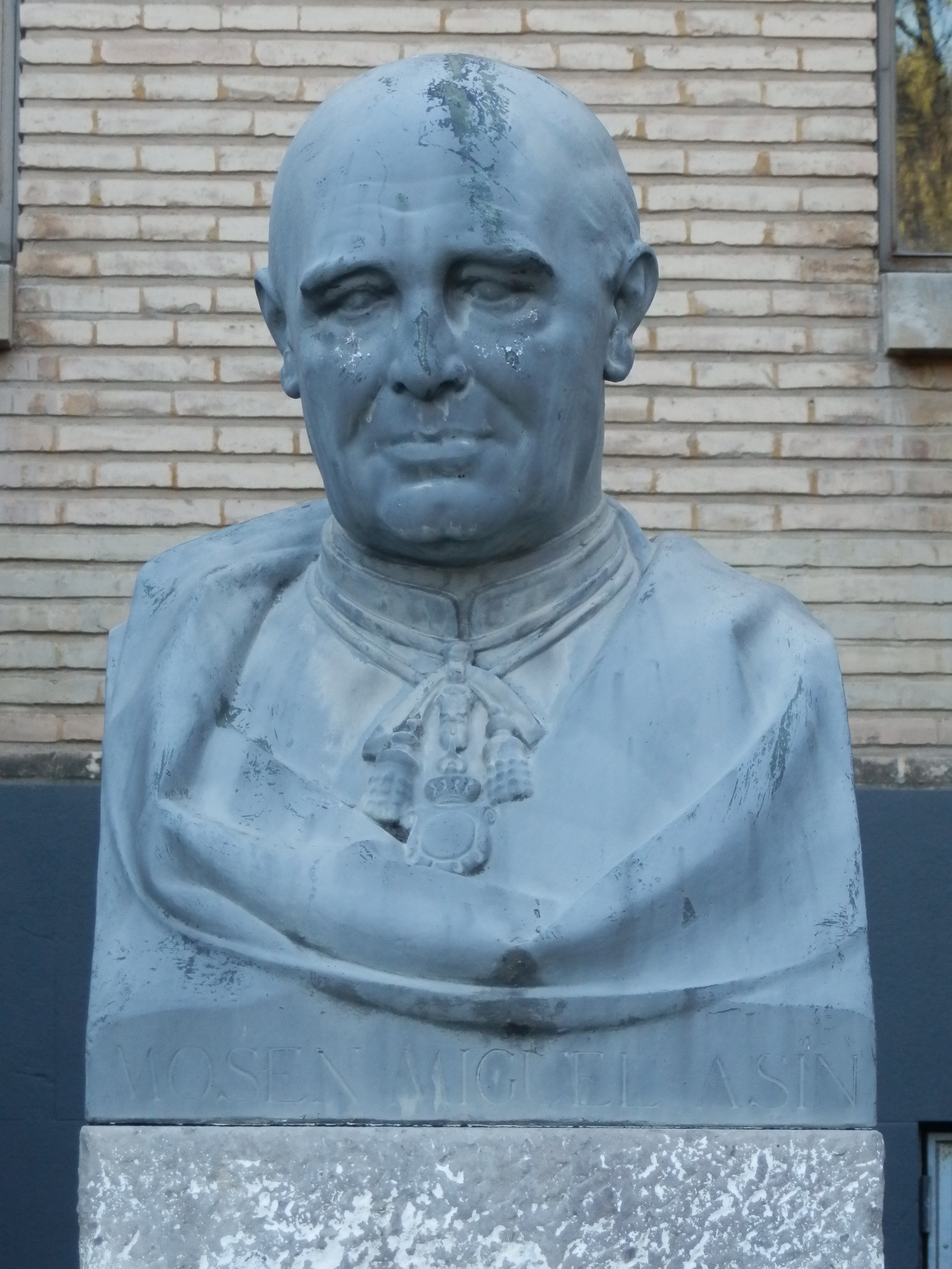 Estatua de Mosén Miguel Asín.